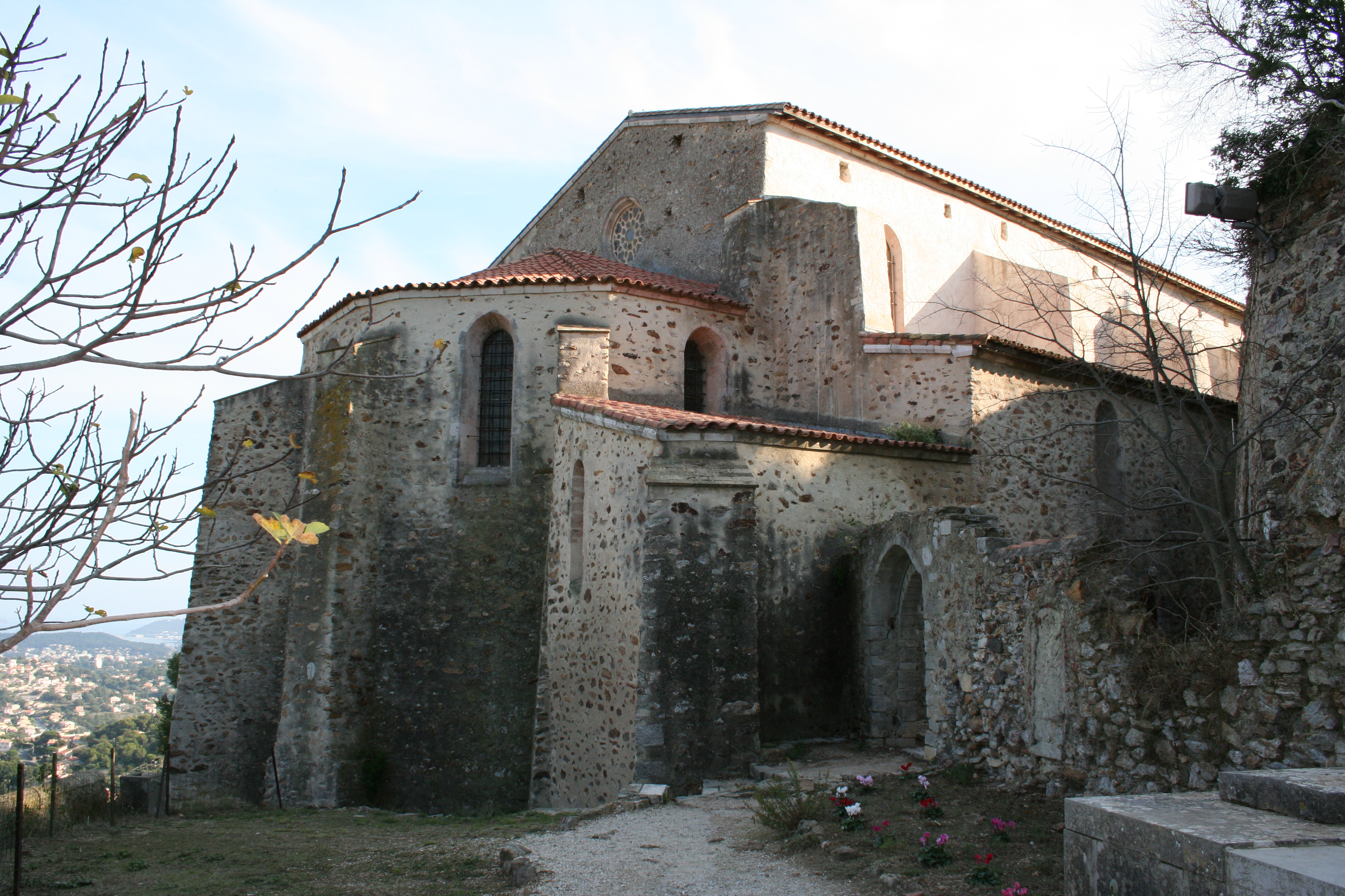 Vue de l'abside de la collégiale saint Pierre à Six-Fours.